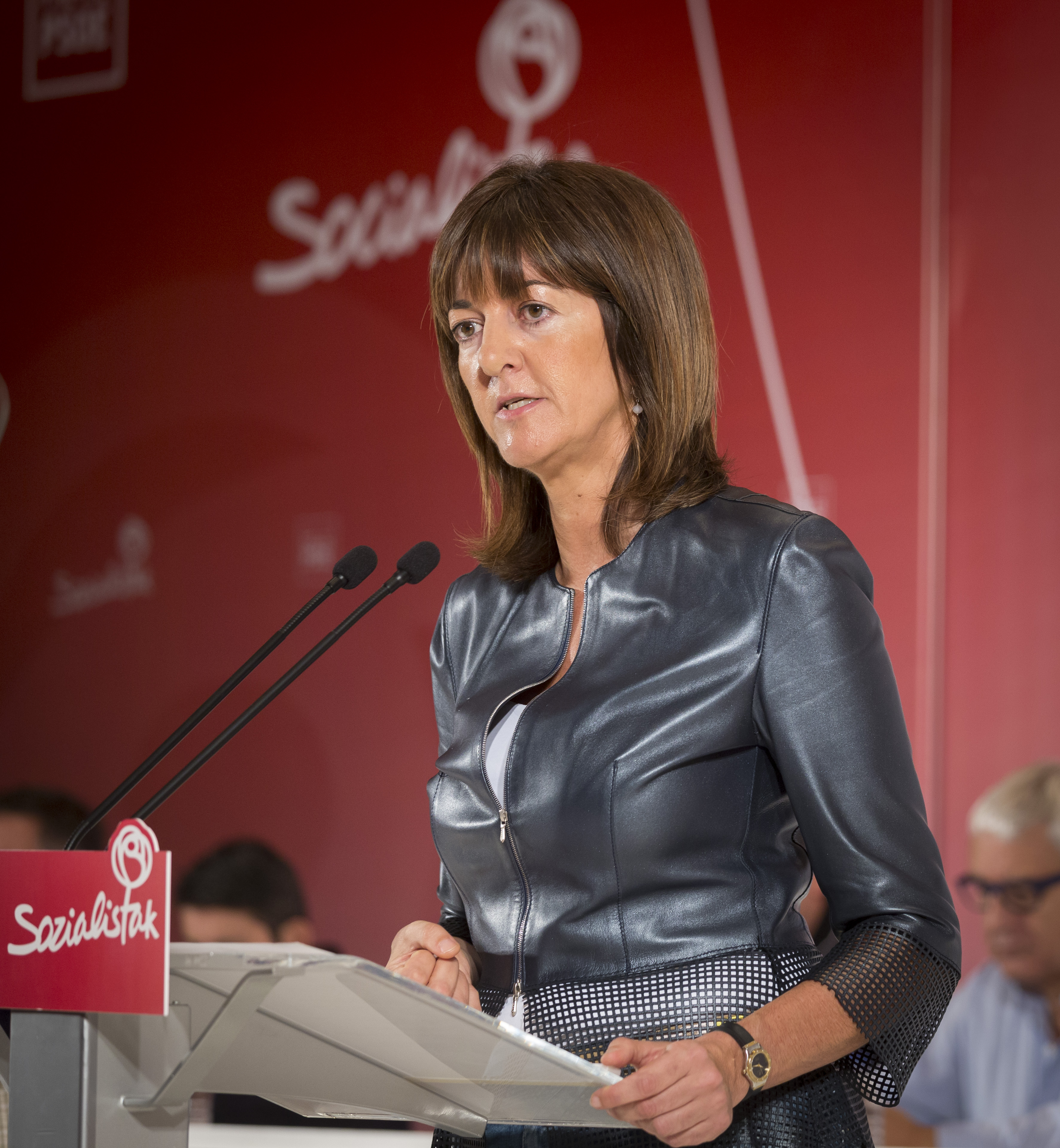 Idoia Mendia, Secretaria General de los Socialistas Vascos, en un Comité Nacional del PSE-EE (25.10.2015)